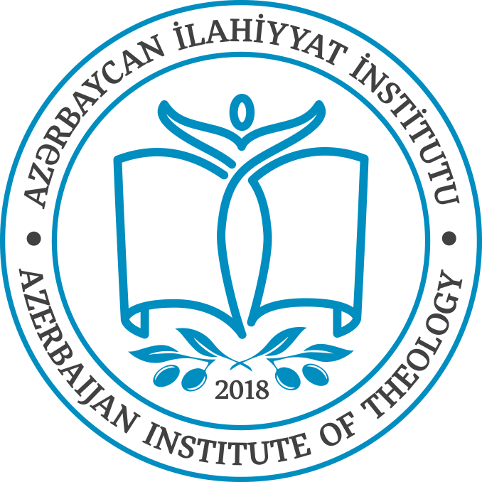 Azərbaycan Respublikasının Dini Qurumlarla İş üzrə Dövlət Komitəsinin tabeliyində Azərbaycan İlahiyyat İnstitutunun loqosu